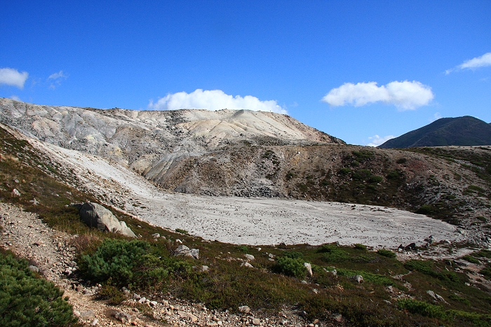 硫黄に覆われた火山礫の斜面 イワオヌプリ